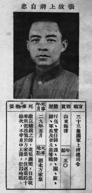 中文（台灣）: 抗戰軍人忠烈錄第一輯中的烈士遺像